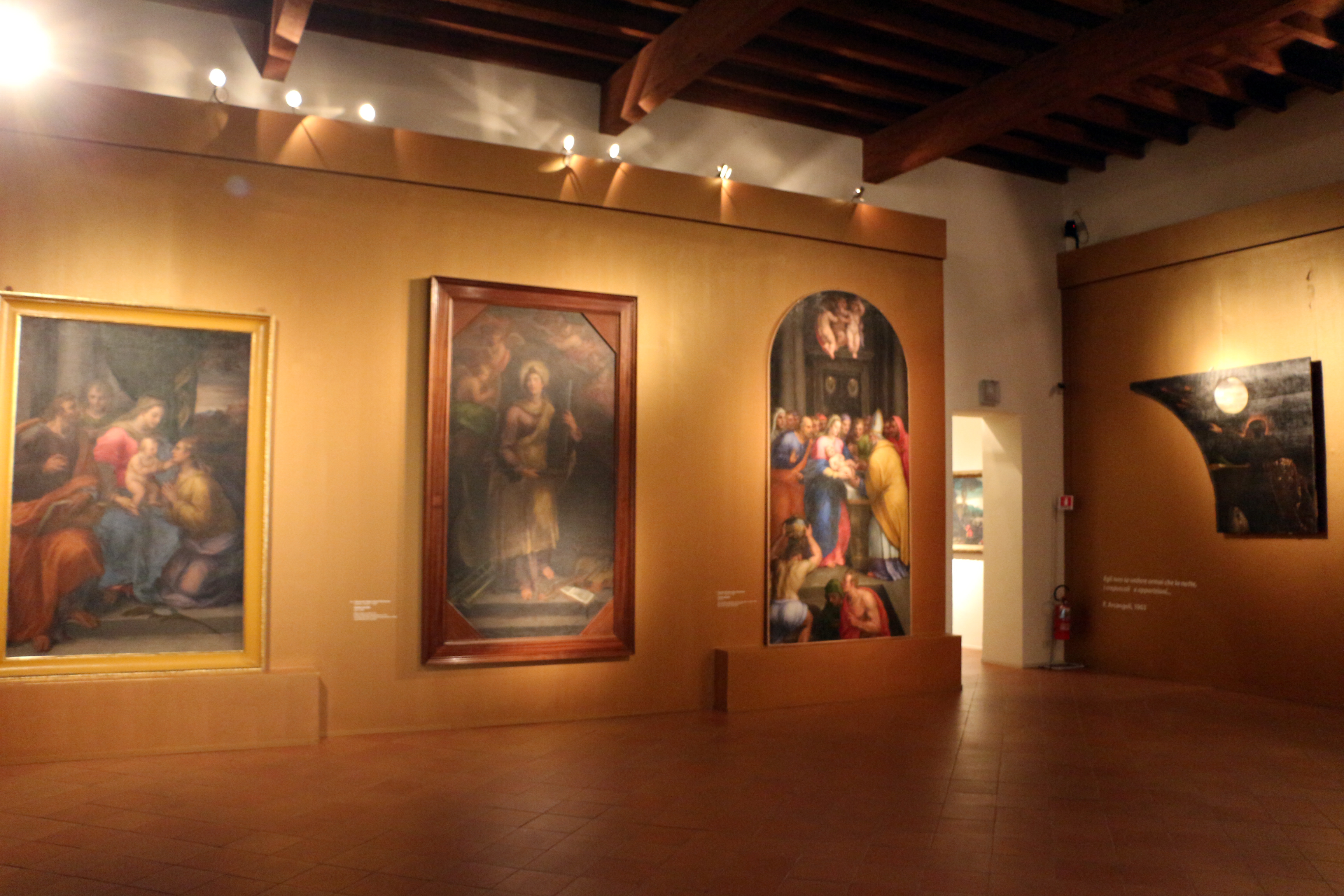 Palazzo dei Diamanti (Ferrara) This is a photo of a monument which is part of cultural heritage of Italy.